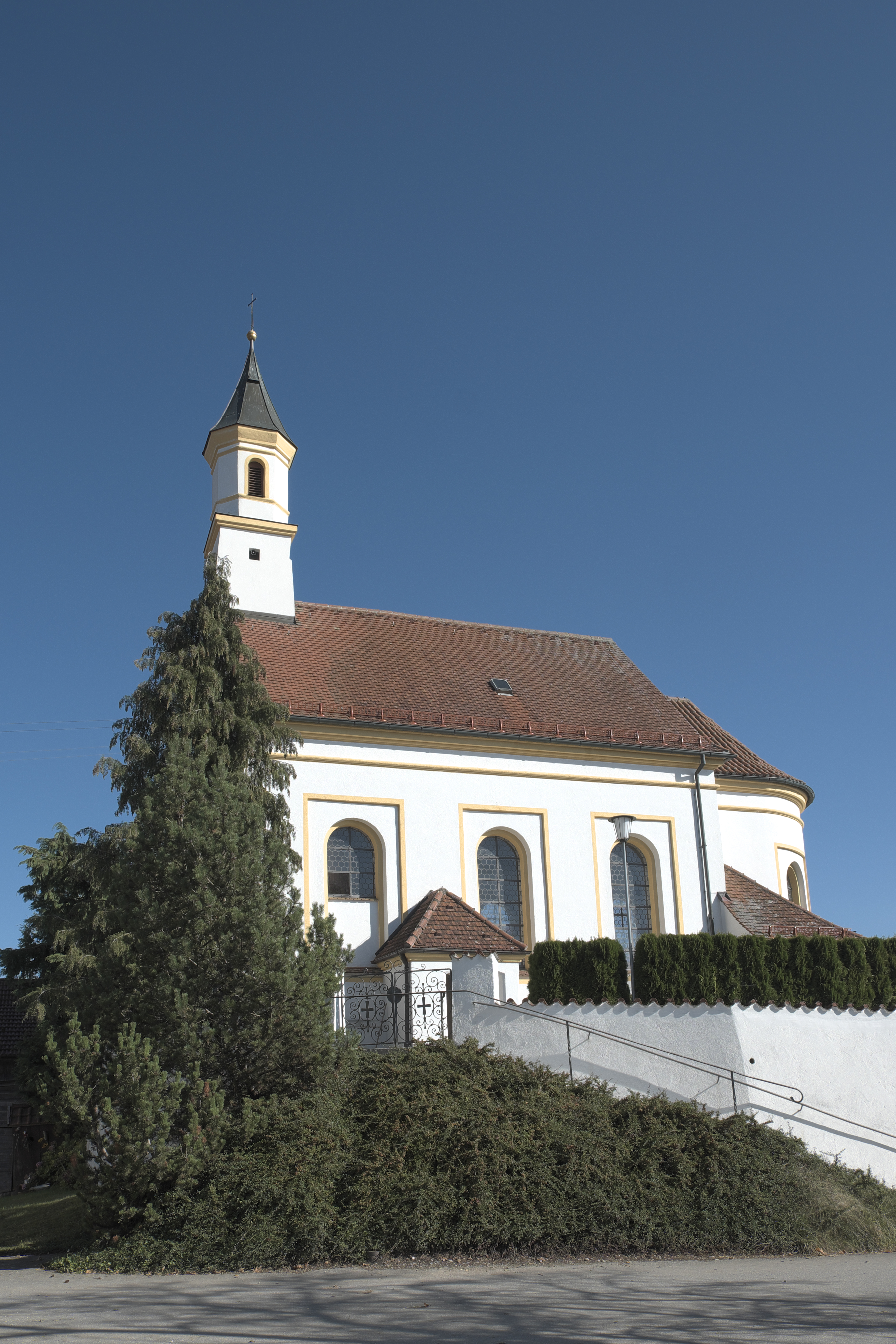 Katholische Filialkirche St. Pankratius in Ramsach (Penzing) im Landkreis Landsberg am Lech (Bayern/Deutschland)